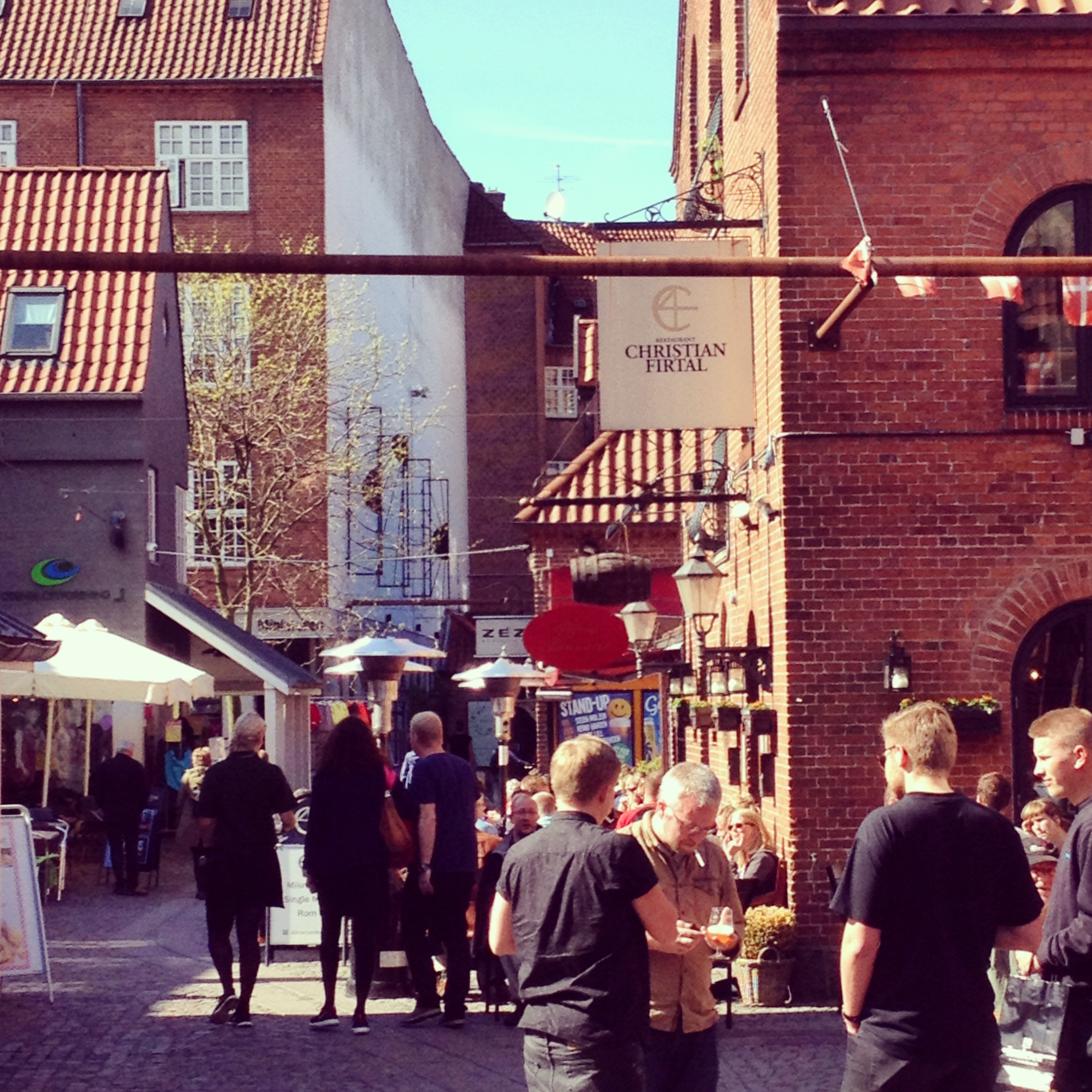 Pale Ale Festival i Vintapperstræde i Odense maj 2014